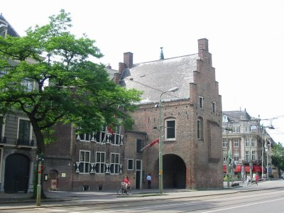 Gevangenpoort, Den Haag, juni 2003, foto gemaakt en ter beschikking gesteld voor vrij gebruik door Gebruiker:Ellywa